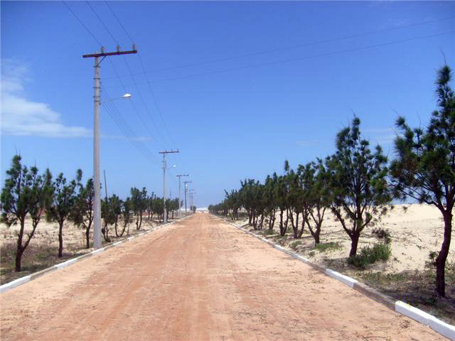 Um dos trechos urbanizados de Nova Camboriú